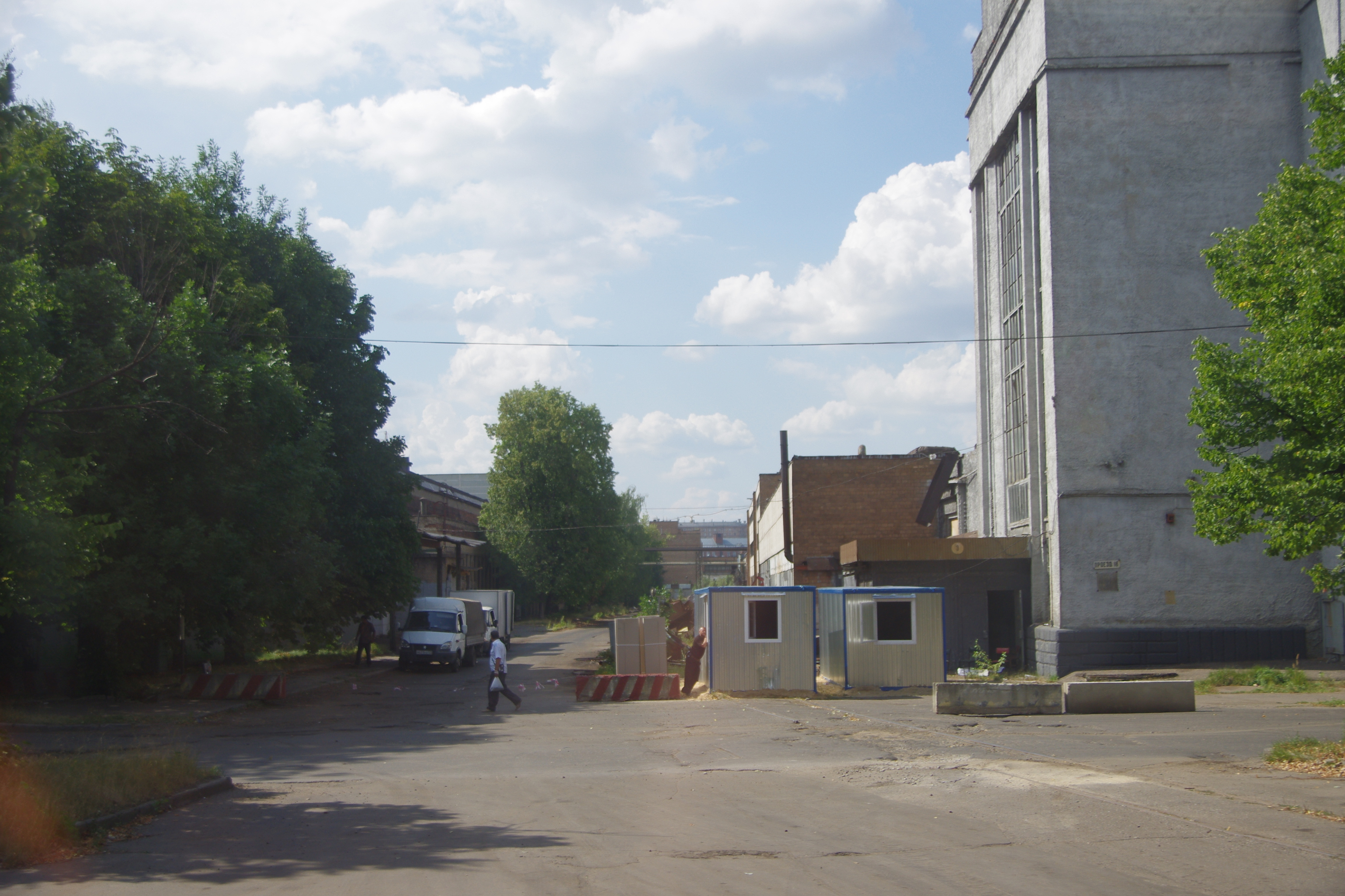 Экскурсия на ЗИЛ